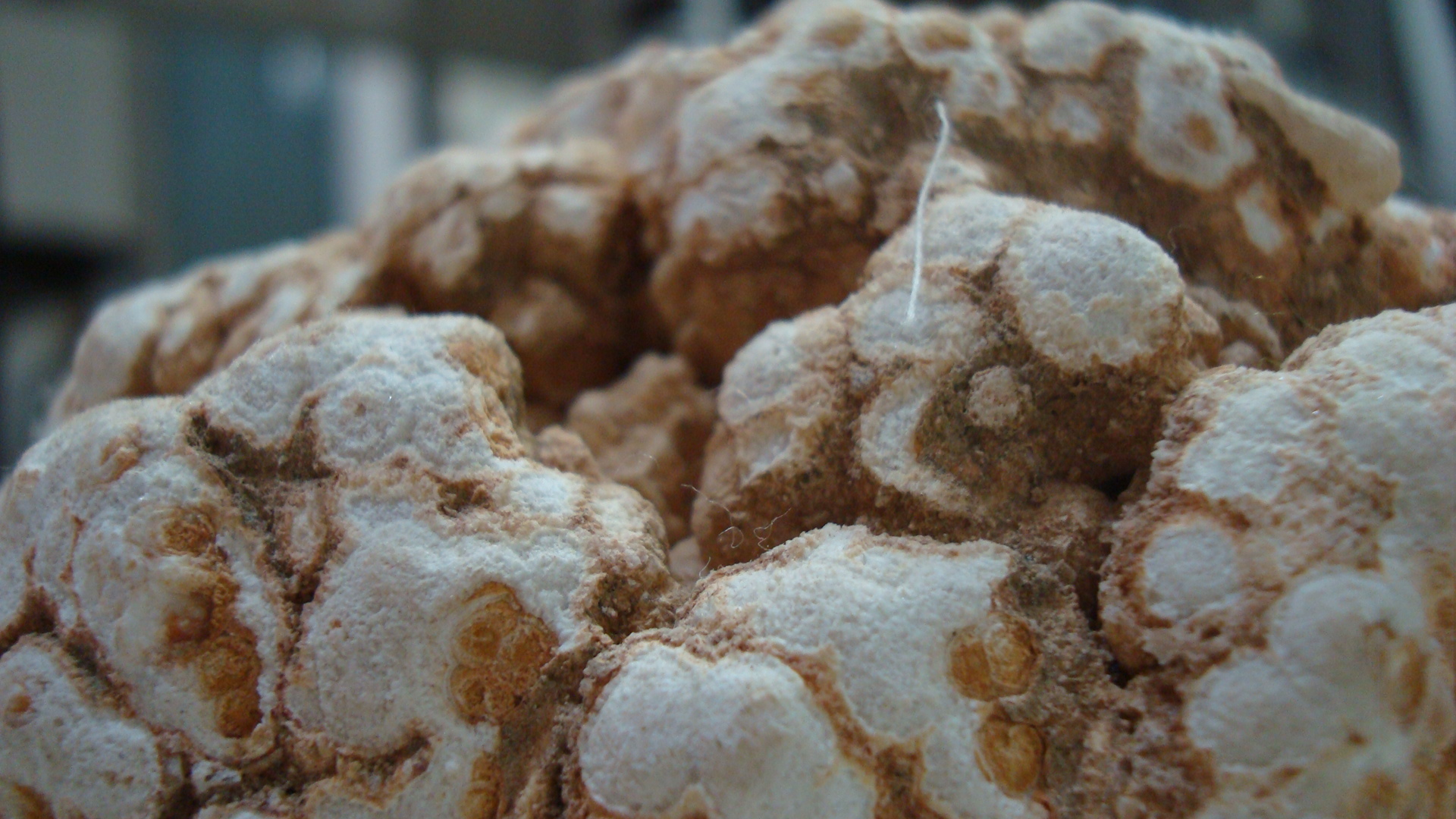 یک نوع سنگ کشف شده در غار درونه